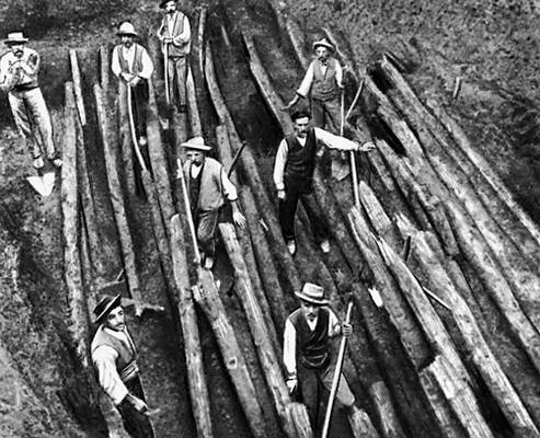 Остатки настила свайного поселения (террамары) близ г. Парма в Италии